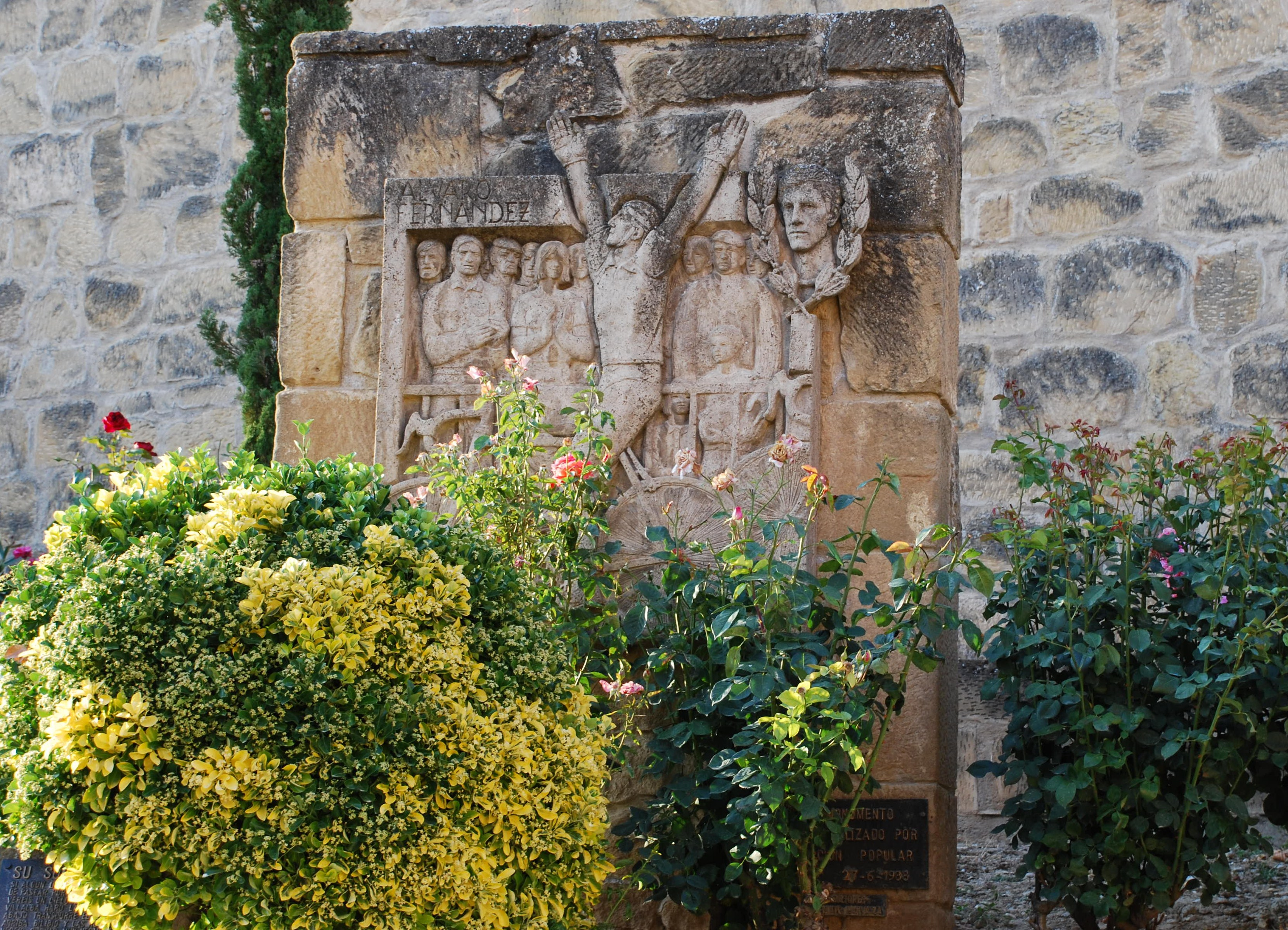 Monumento en homenaje a Álvar Fernández